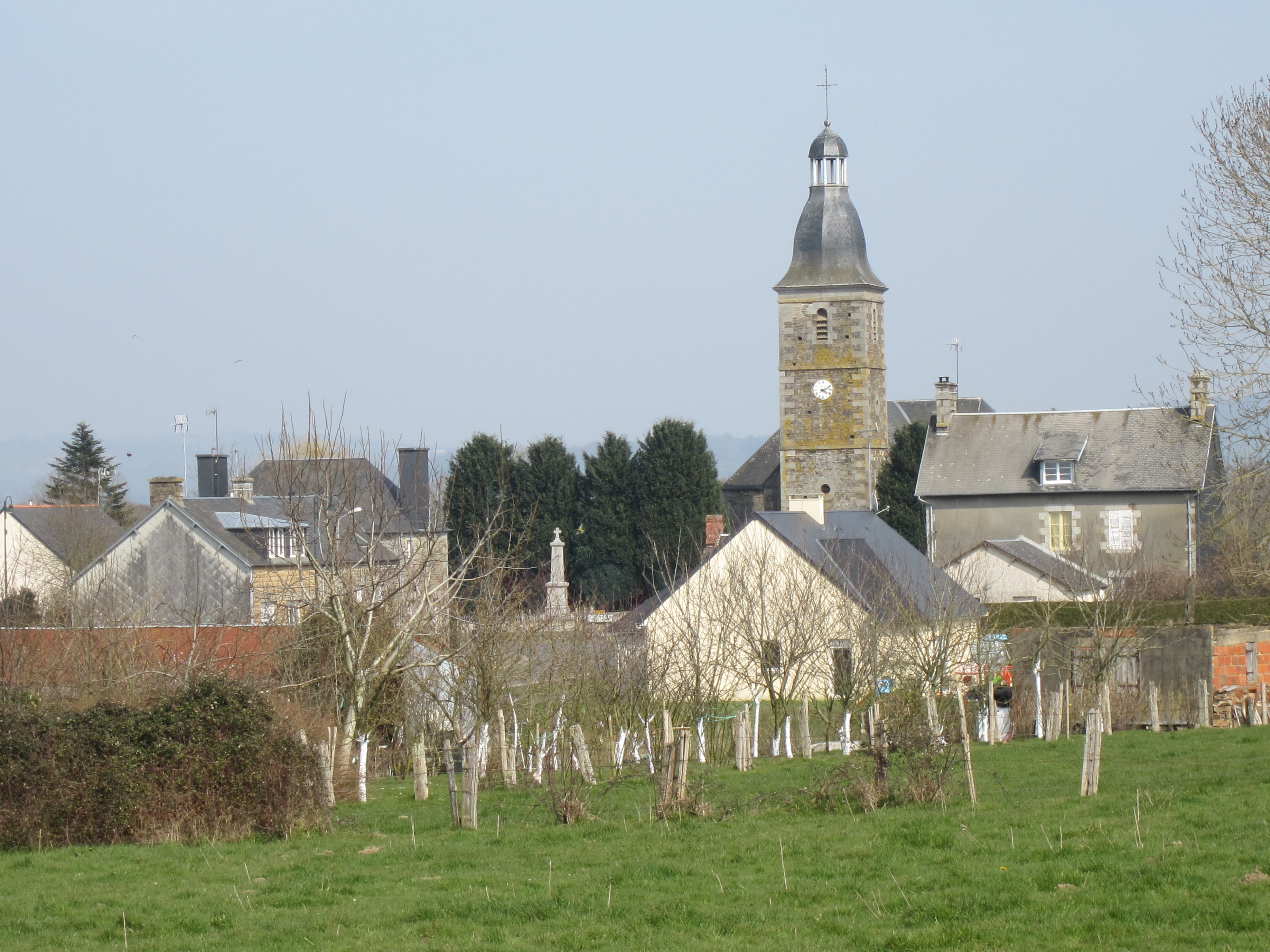 Le Mesnil-Adelée